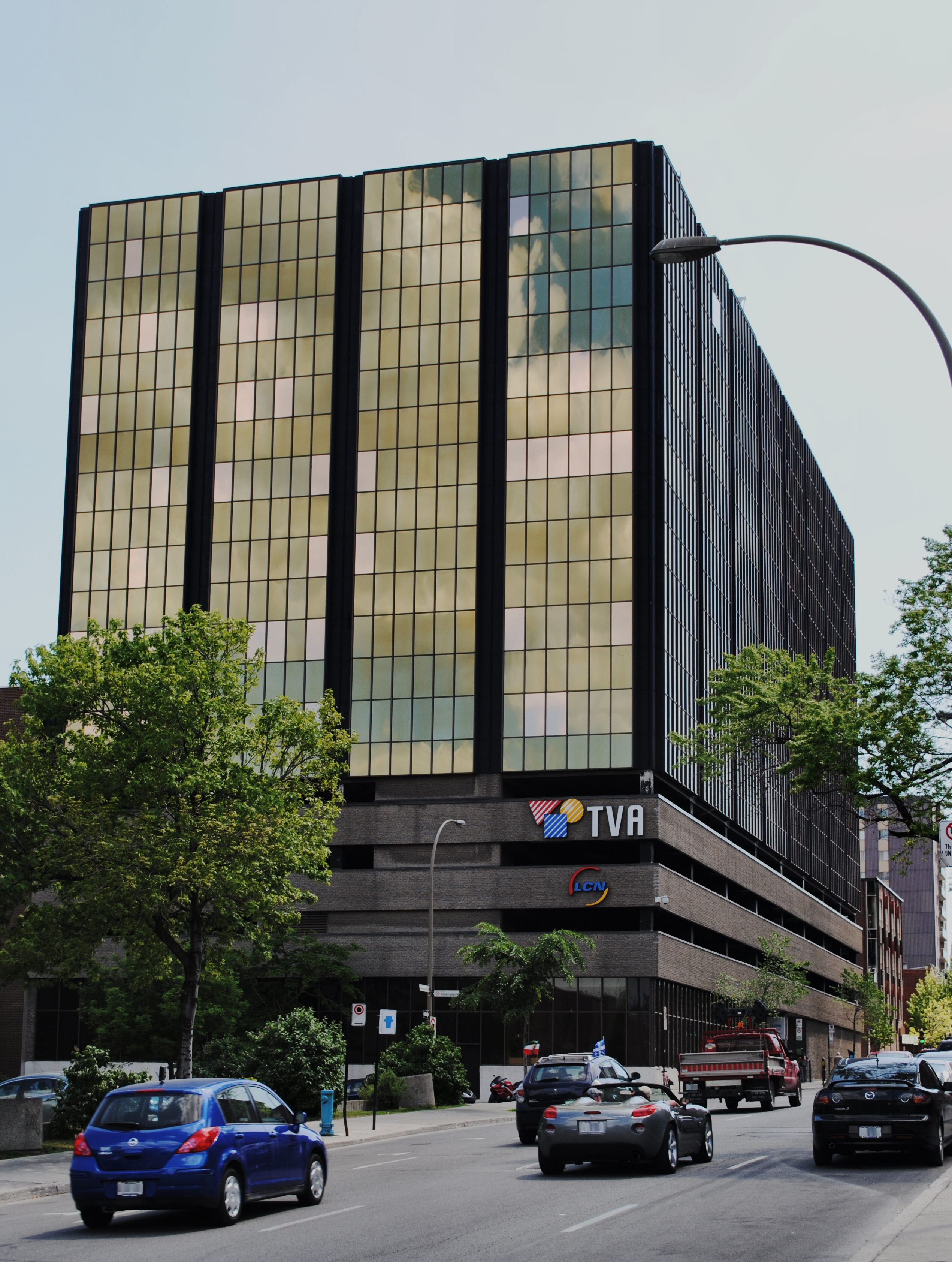 Siège social du réseau TVA